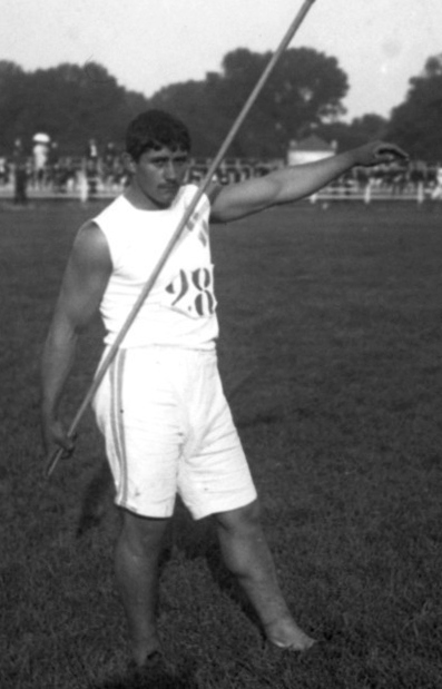 Dorizas dans le lancer de javelot, 1er août 1908 [meeting international d'athlétisme, à Colombes] : [photographie de presse] / [Agence Rol]